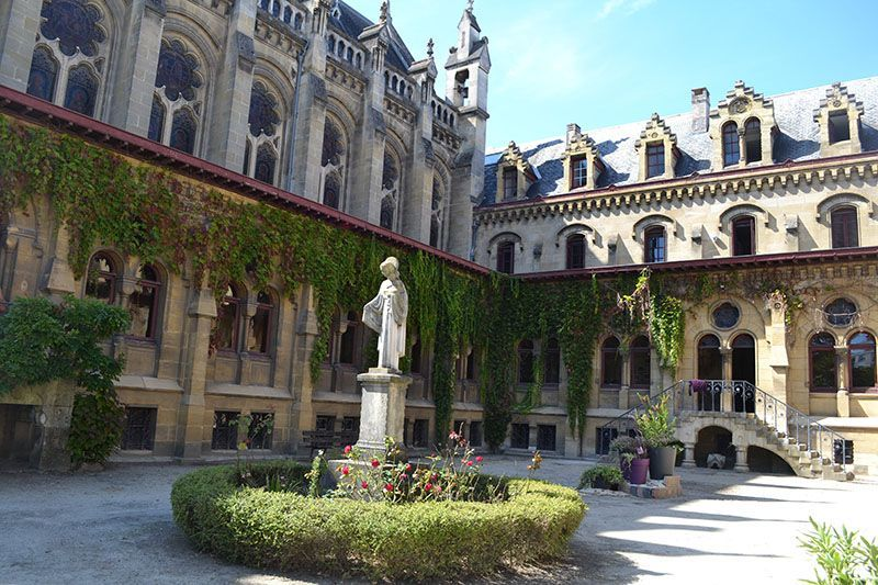 Photo asc